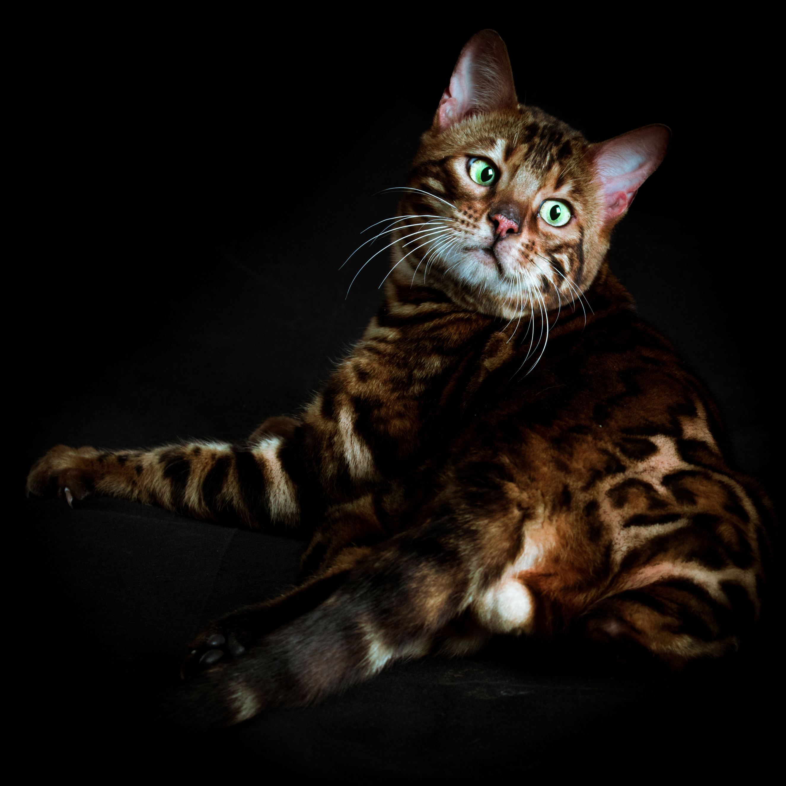 Gato Bengalí ojos verdes